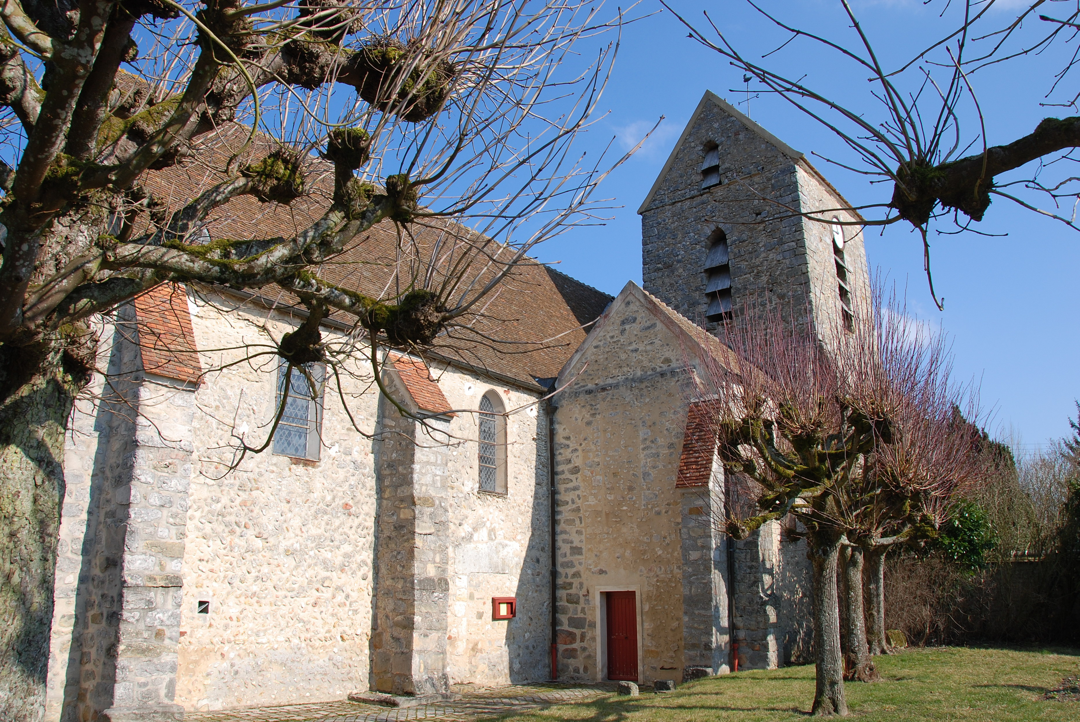 L'église Saint Martin de Recloses